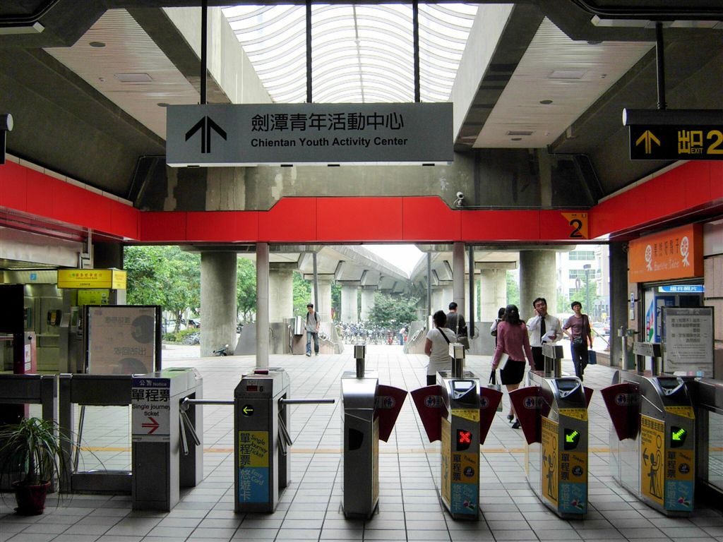 劍潭站出口2與驗票閘門